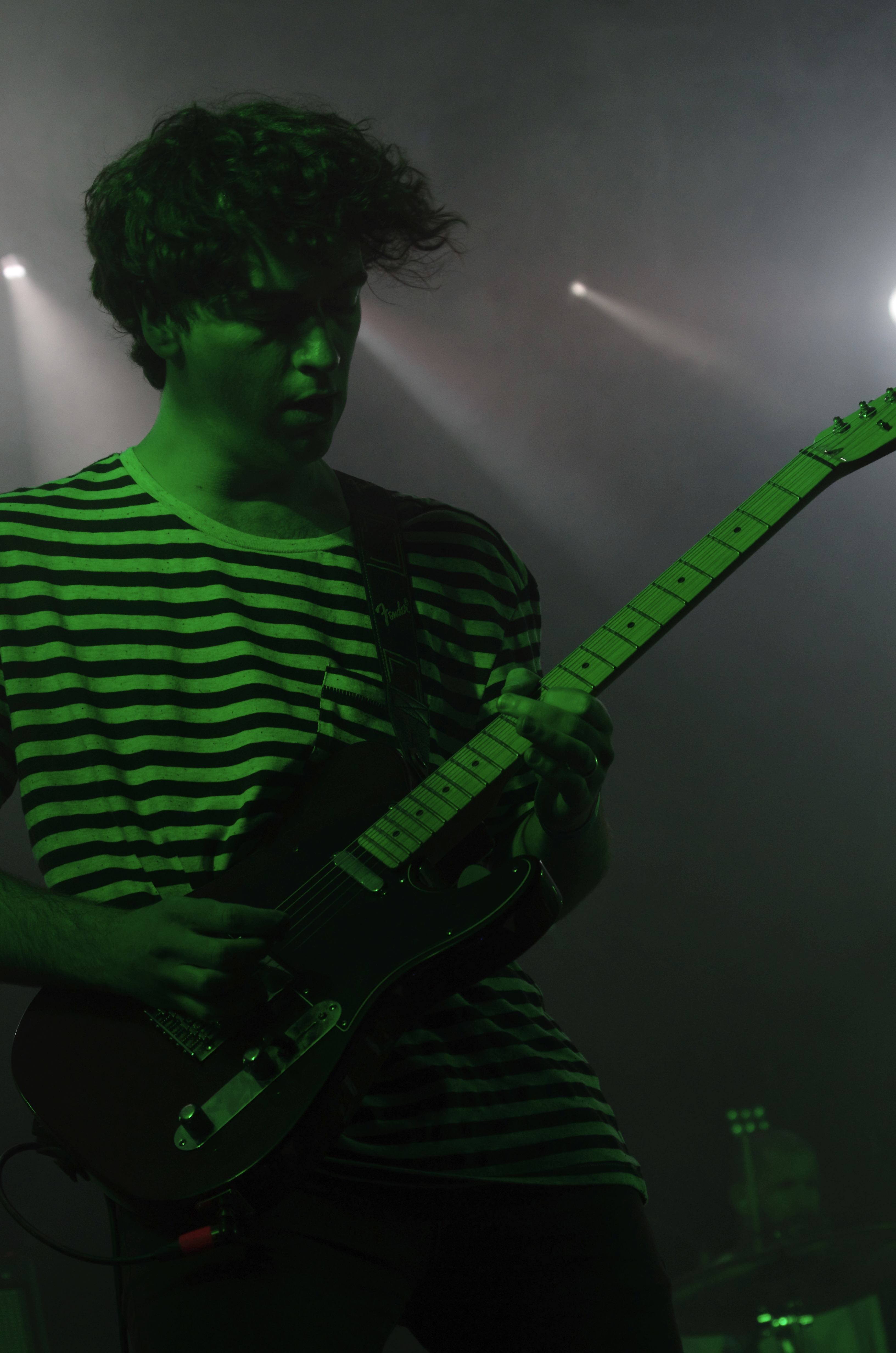 Pull Apart By Horses beim Krach am Bach Festival, Beelen 2014. James Brown (g)